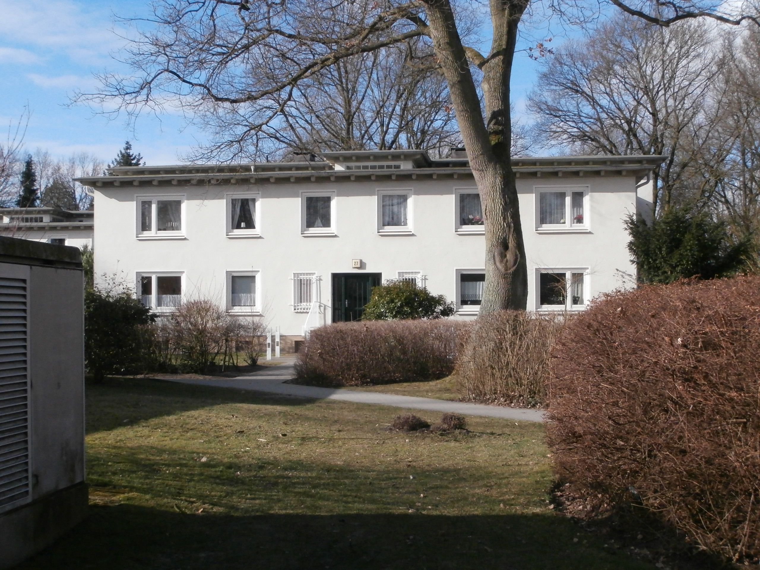 1949-1954 nach Plänen von Max Corleis und Heinz Graaf als „Garten-Siedlung Mechelnbusch“ errichtete Wohn- und Gartenanlage mit Waschhaus. This is a photograph of an architectural monument.